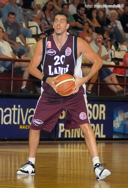 Ariel Eslava jugador de baloncesto